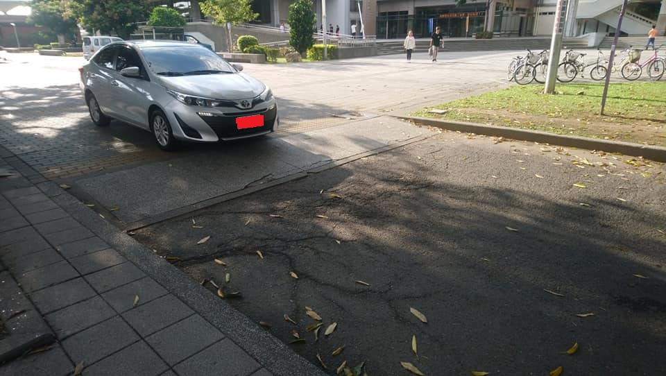 中文（台灣）: 一台車開在路上